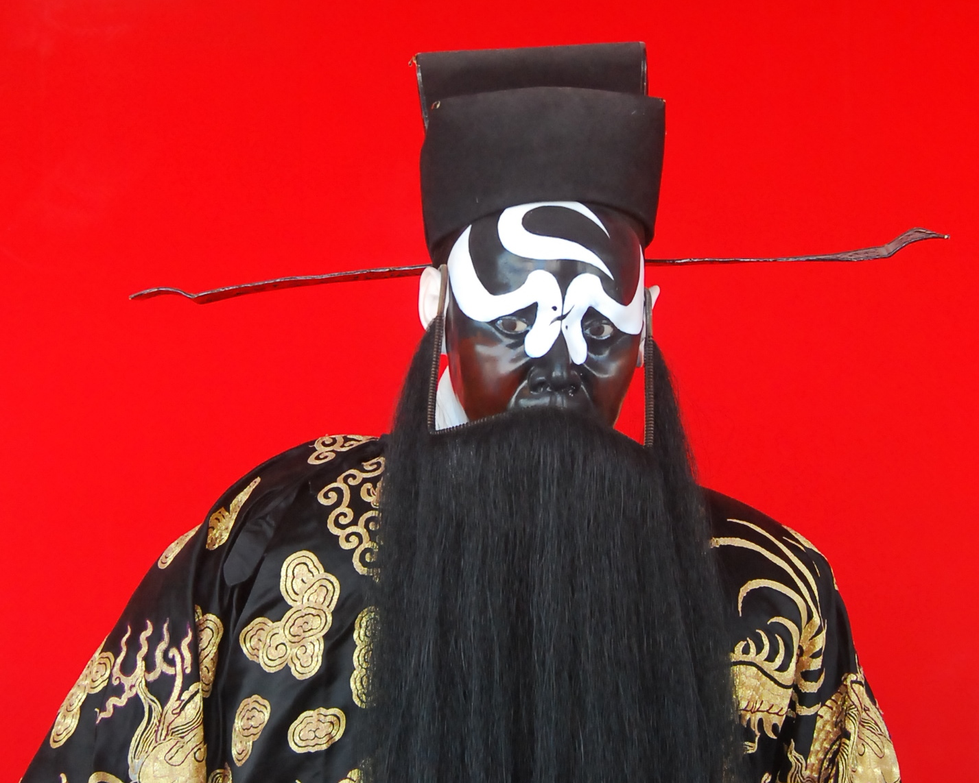 京剧中的包拯